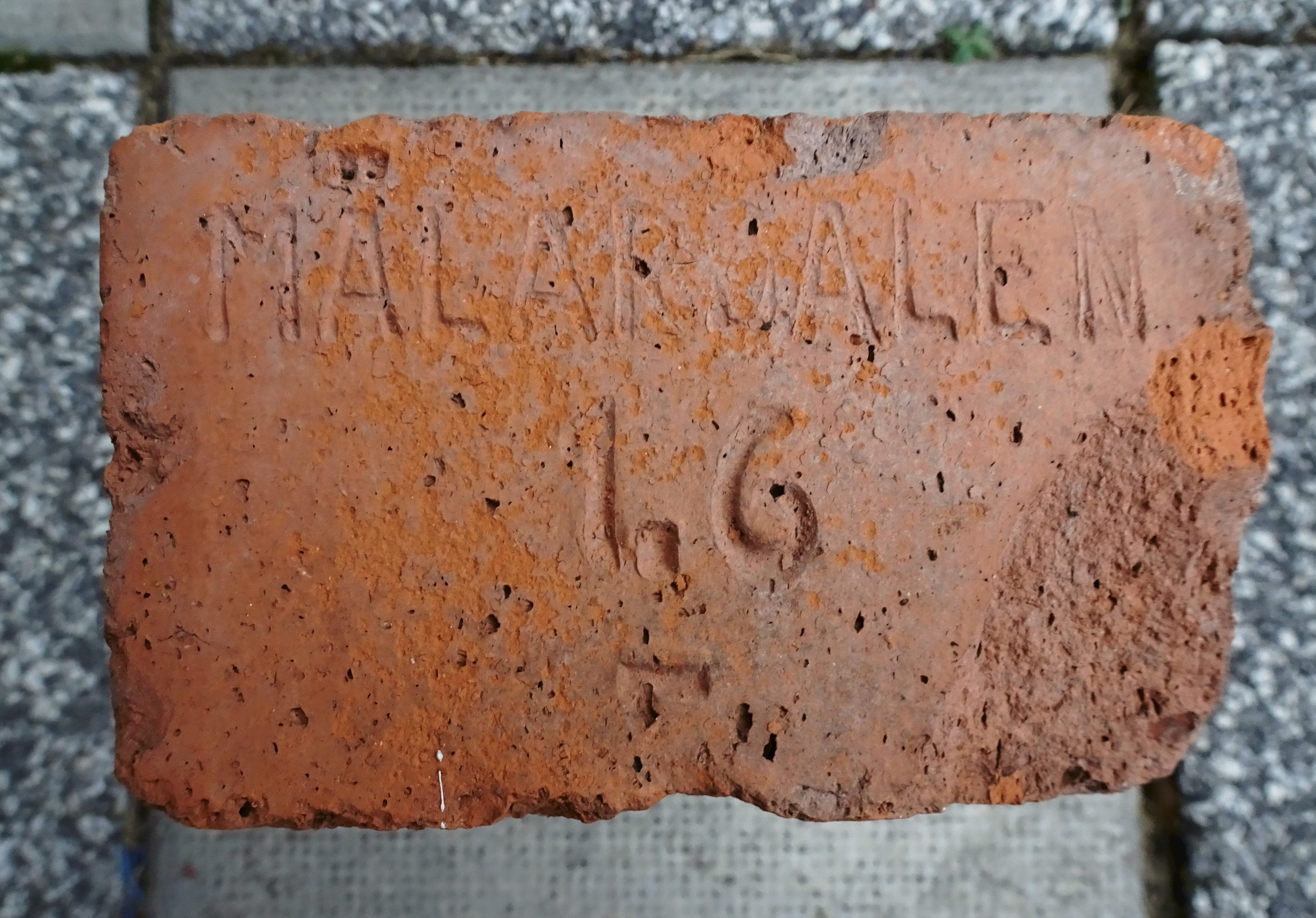 Koppyta på en murtegel från Mälardalens tegelbruk